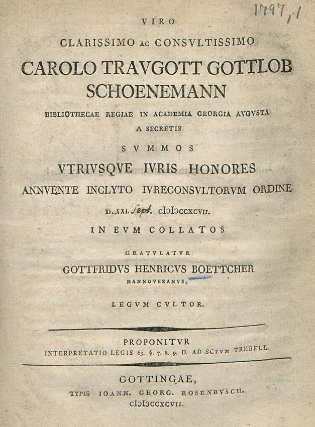 Gottfried_Heinrich_Böttcher: Interpretatio Legis 63 § 7. 8. 9. D. ad Senatus Consultum Trebellianum, gewidmet Carl Traugott Gottlob Schönemann anlässlich von dessen Promotion zum Dr. iur. utr.